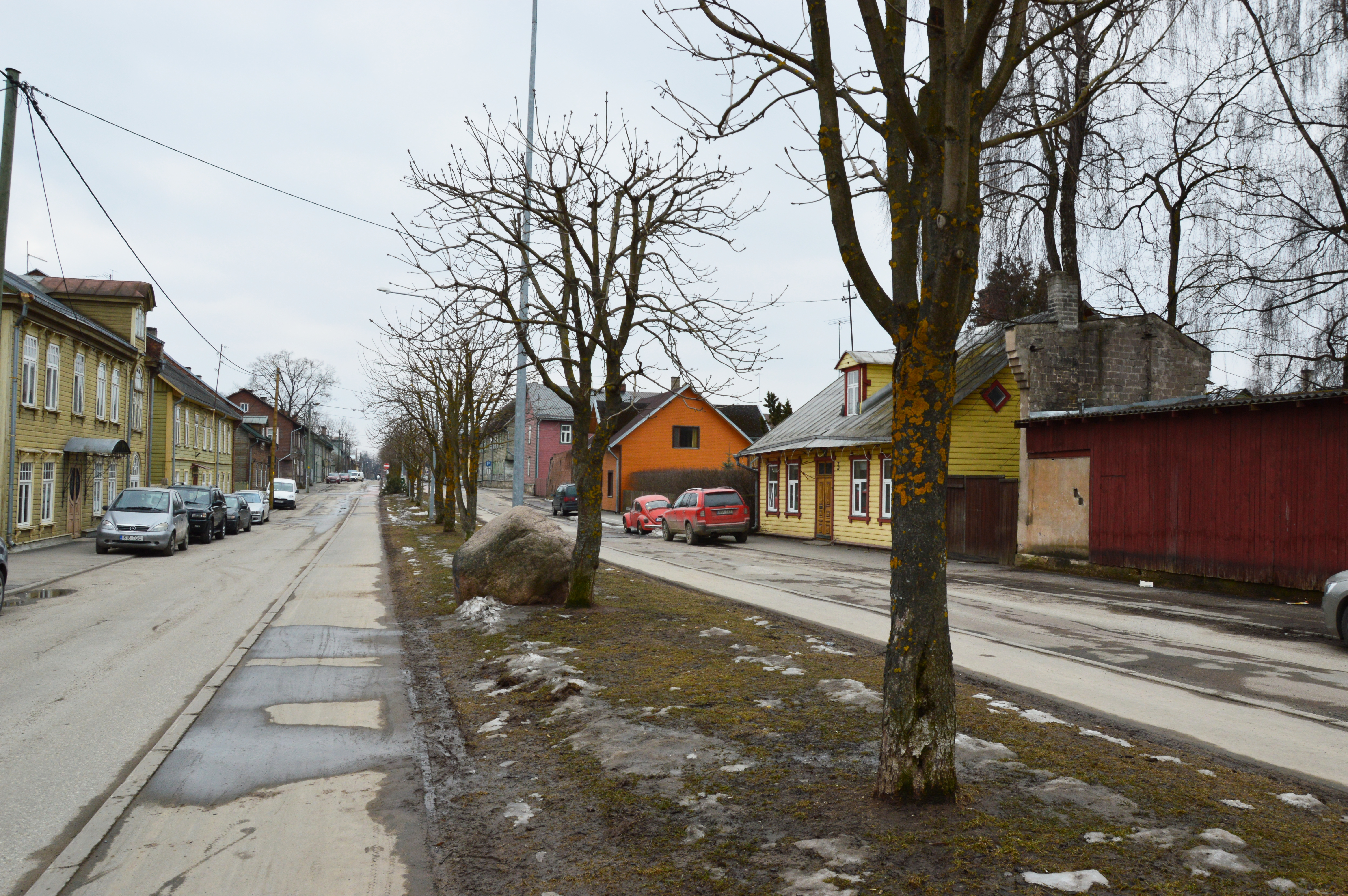 Kesk tänav, Tartu.